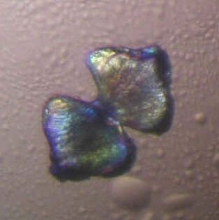 Ausbildung eines kristallinen, amorphen „Schmetterlingskristalls“